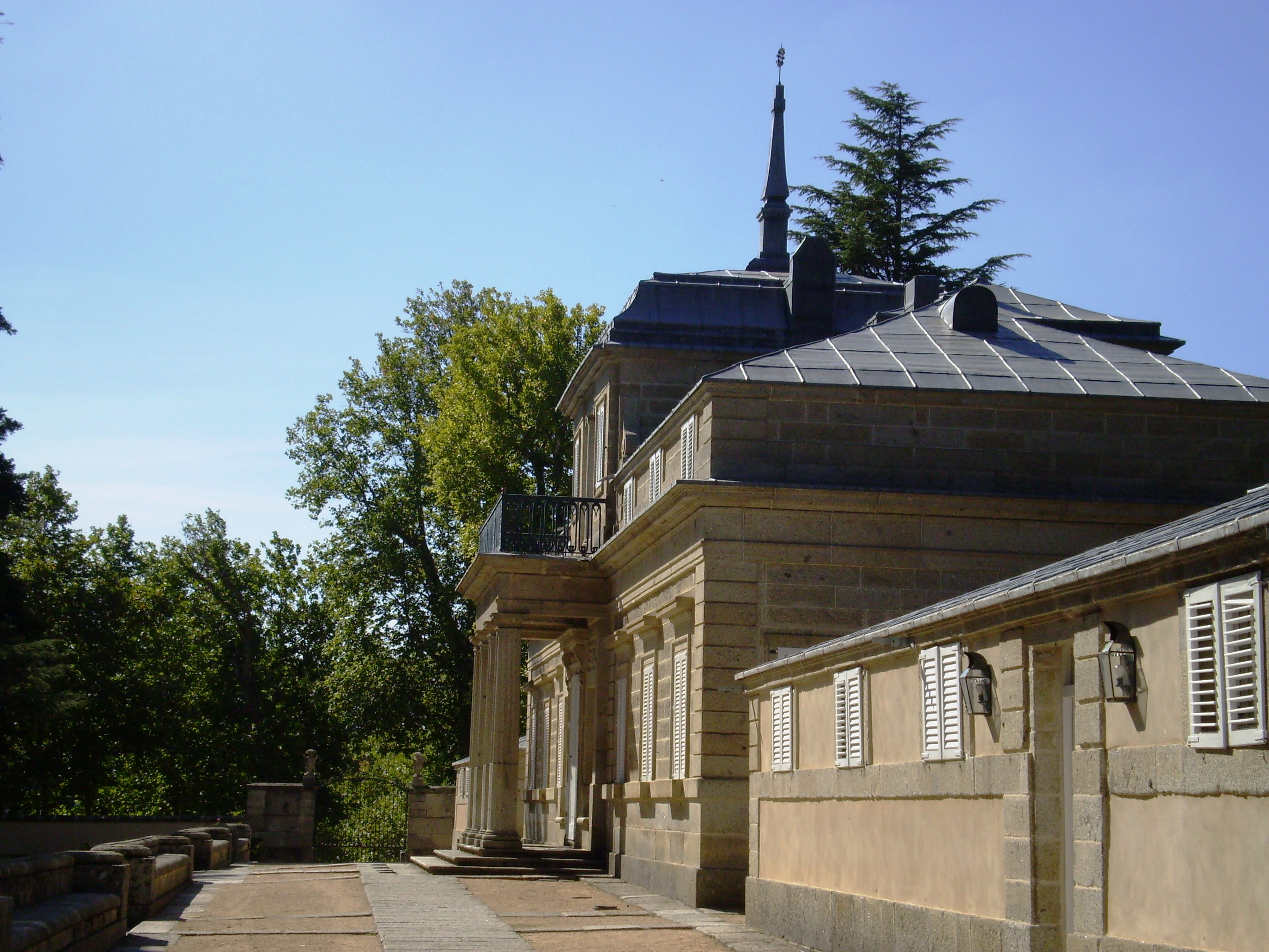 Casita del Príncipe. El Escorial, Community of Madrid, Spain